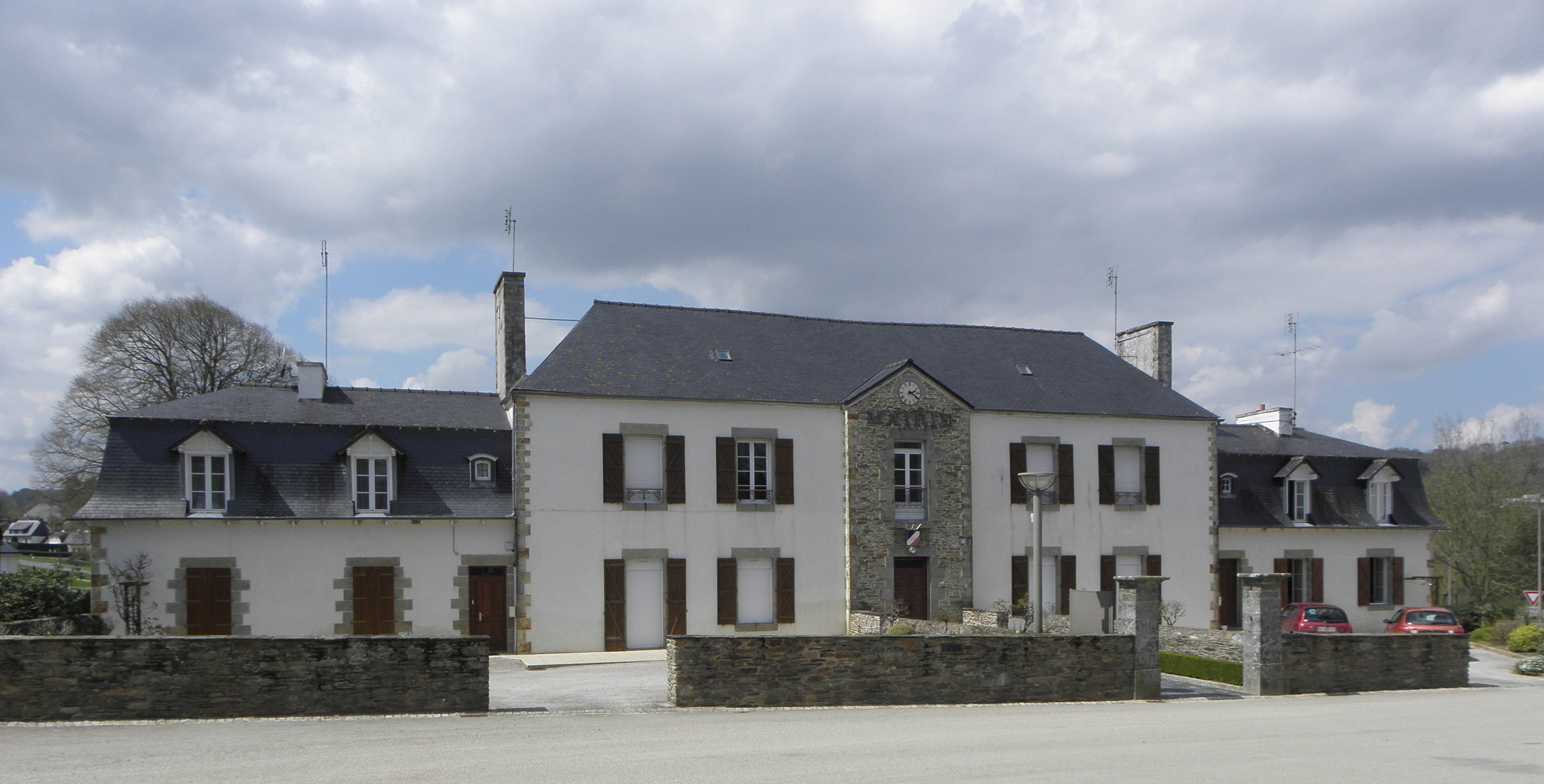 Mairie de Le Quillio (22).